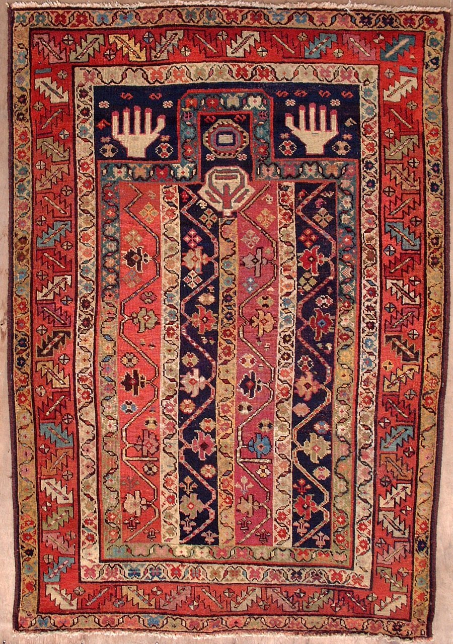 prayer rug